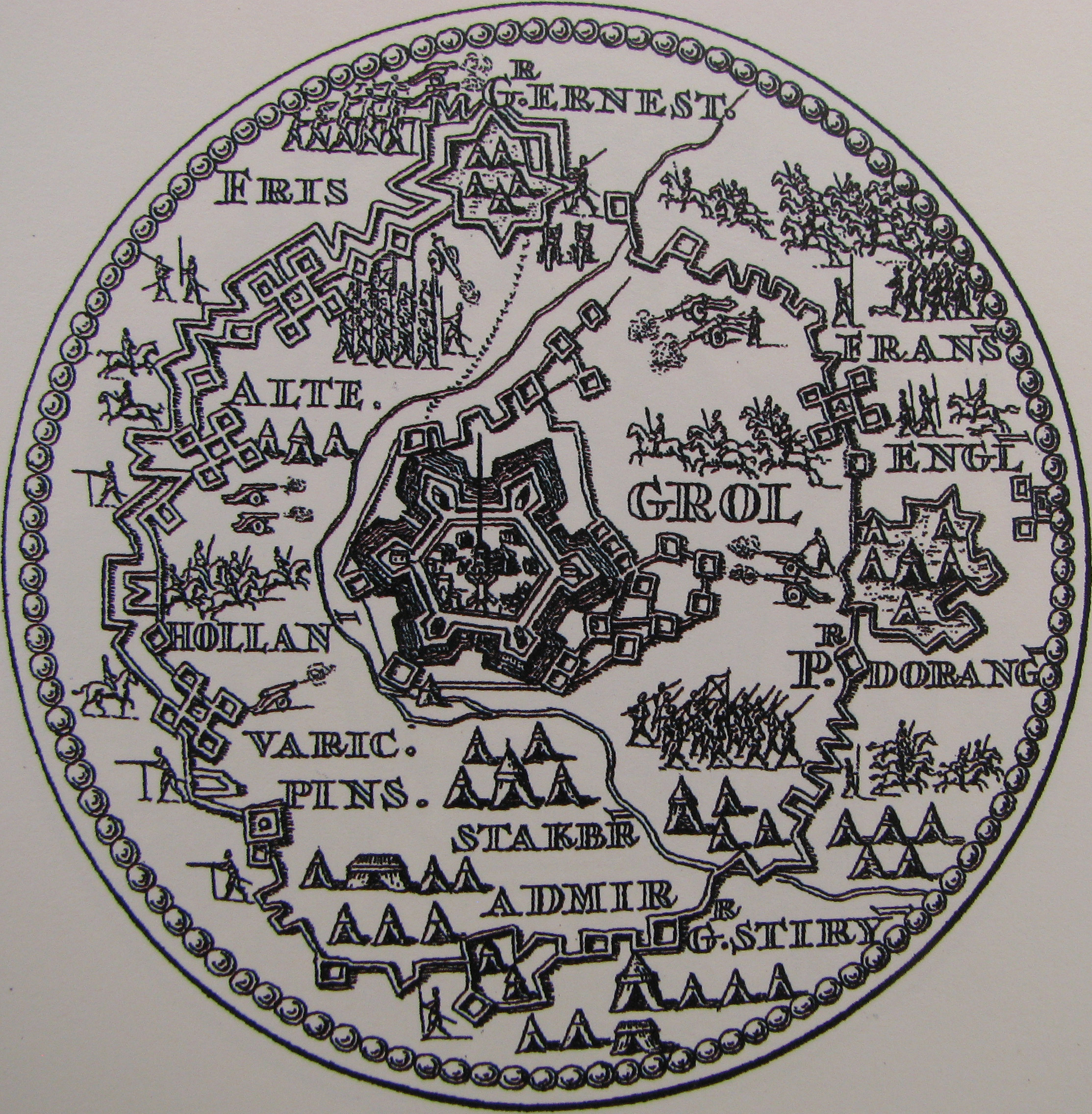 Penning geslagen op de verovering van Grol door Frederik Hendrik, na het beleg van 1627.